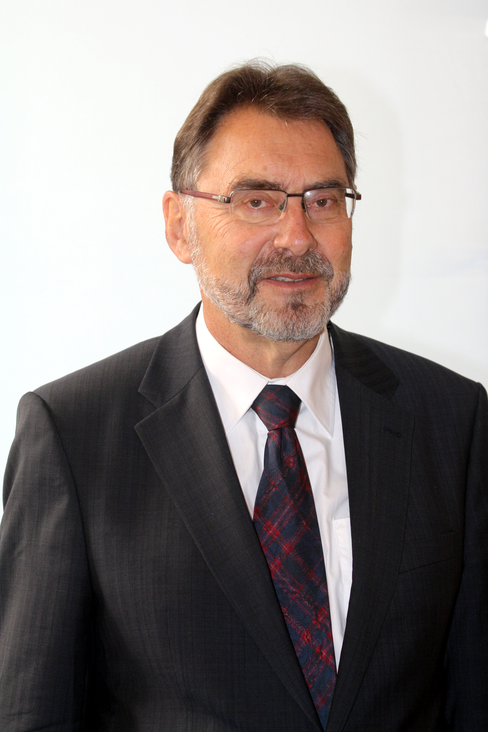 Herbert Kränzlein, deutscher Jurist, Politiker und Abgeordneter im Bayerischen Landtag (SPD), aufgenommen in den Fraktionsräumen der SPD am 11. Dezember 2013.